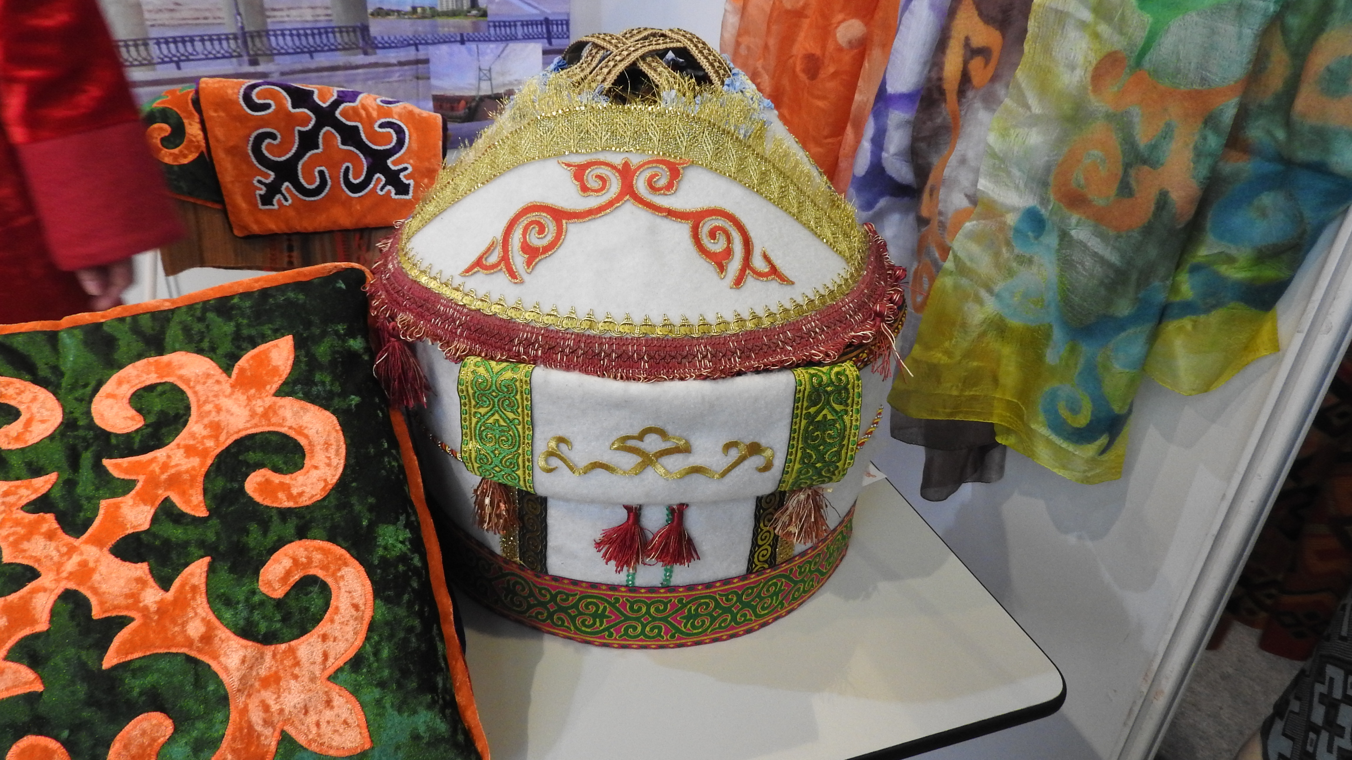 Выставка на ВДНХ ЭКСПО "УФА-ЛАДЬЯ. АРТ.РЕМЕСЛА. СУВЕНИРЫ", Уфа.